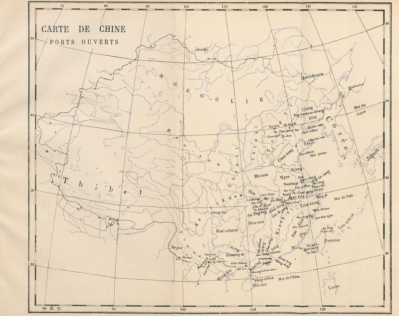 Carte de la Chine en 1898 par Père Louis Gaillard, publiée en 1901, l'année suivant sa mort.